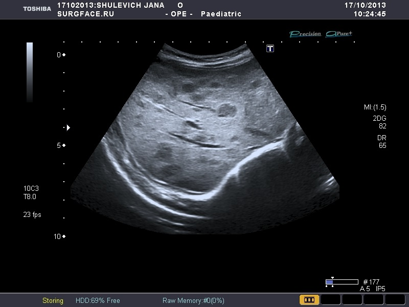 Гемангиомы печени